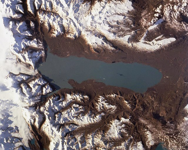 Imagen satelital NASA 1994 del LAgo Viedma